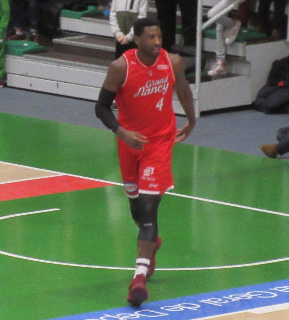 Dario Hunt avec le maillot de Nancy